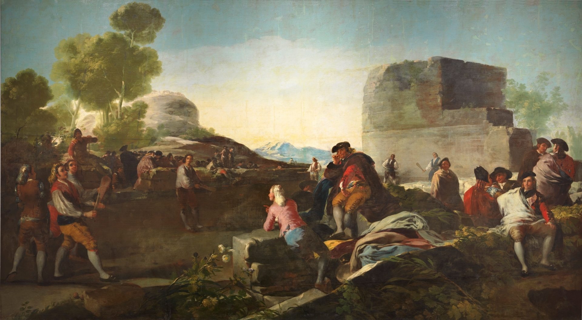 Cartones para tapices.